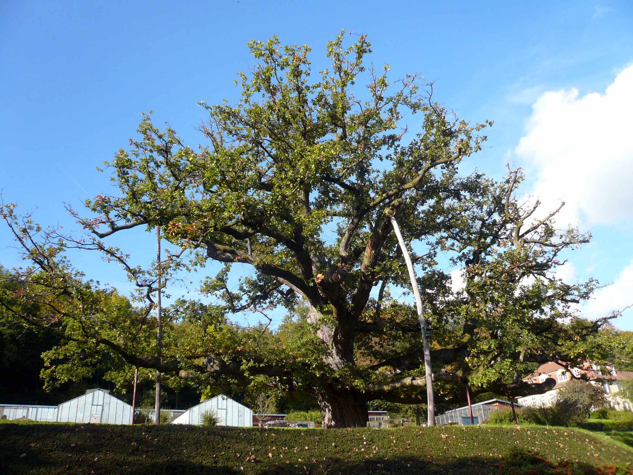 König-Ludwig-oak, Franken